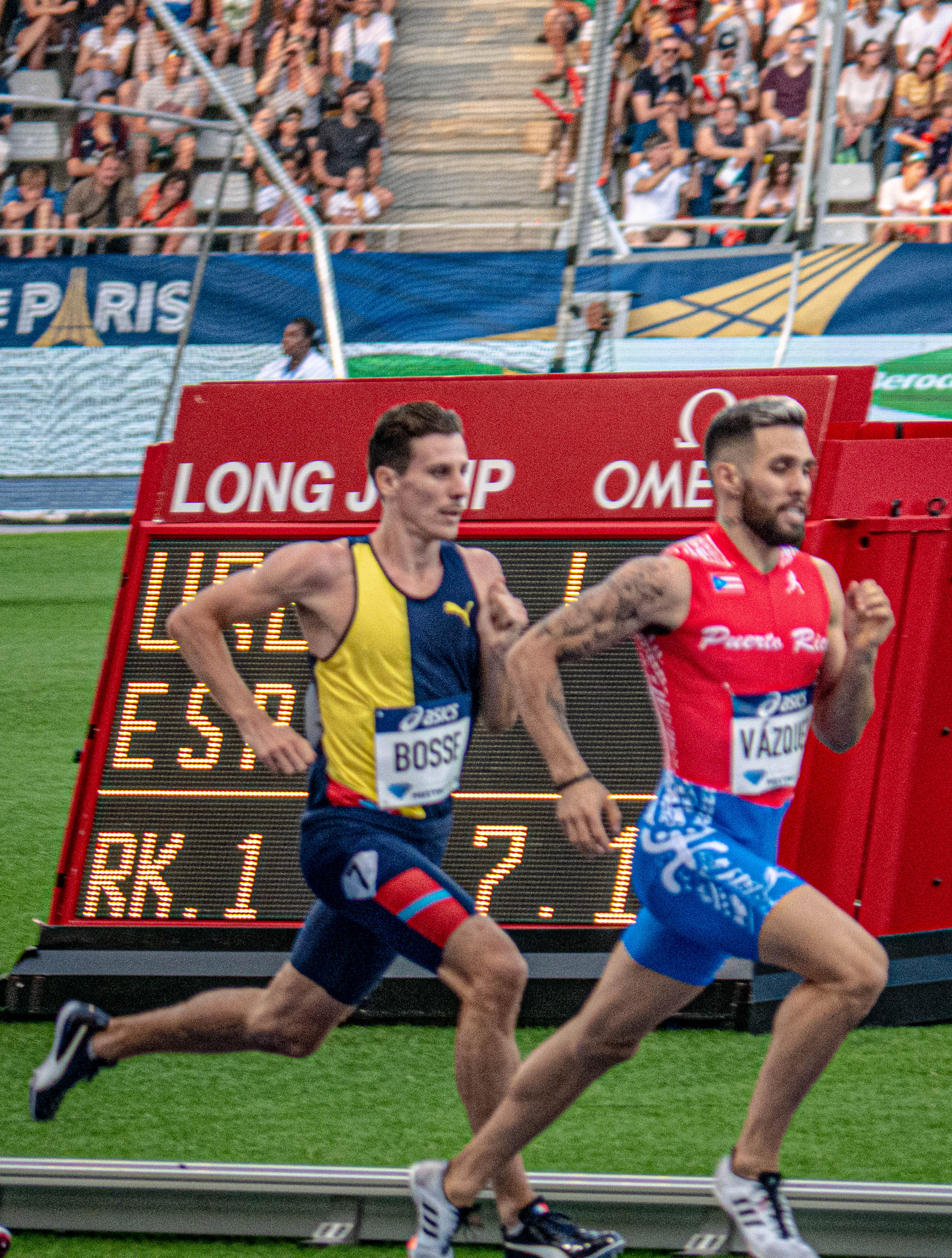 Meeting de Paris 2019 - Compétition d'athlétisme au stade Charlety - 24 août 2019